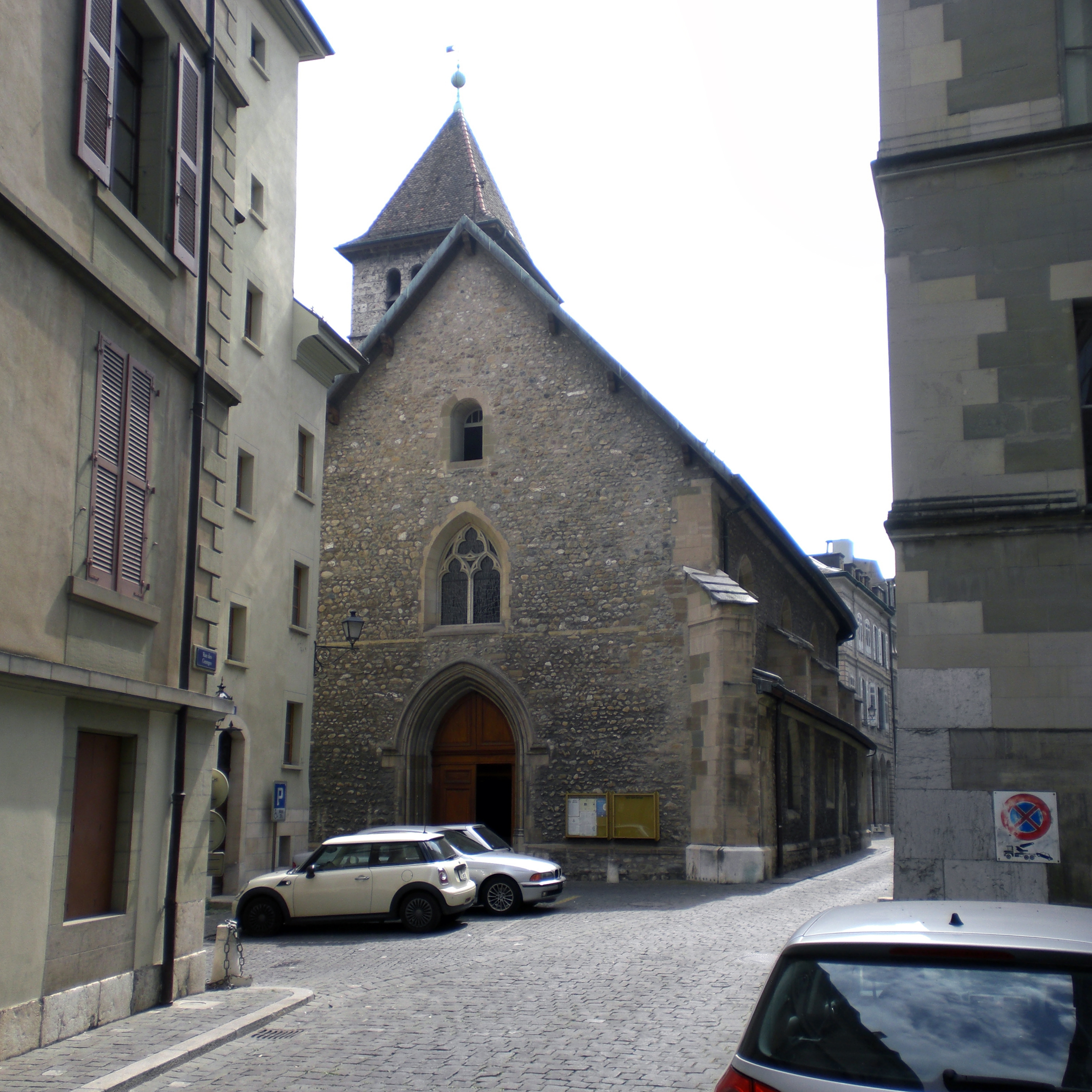 röm.-kath. Kirche St. Germain, Genf, Rue des Granges